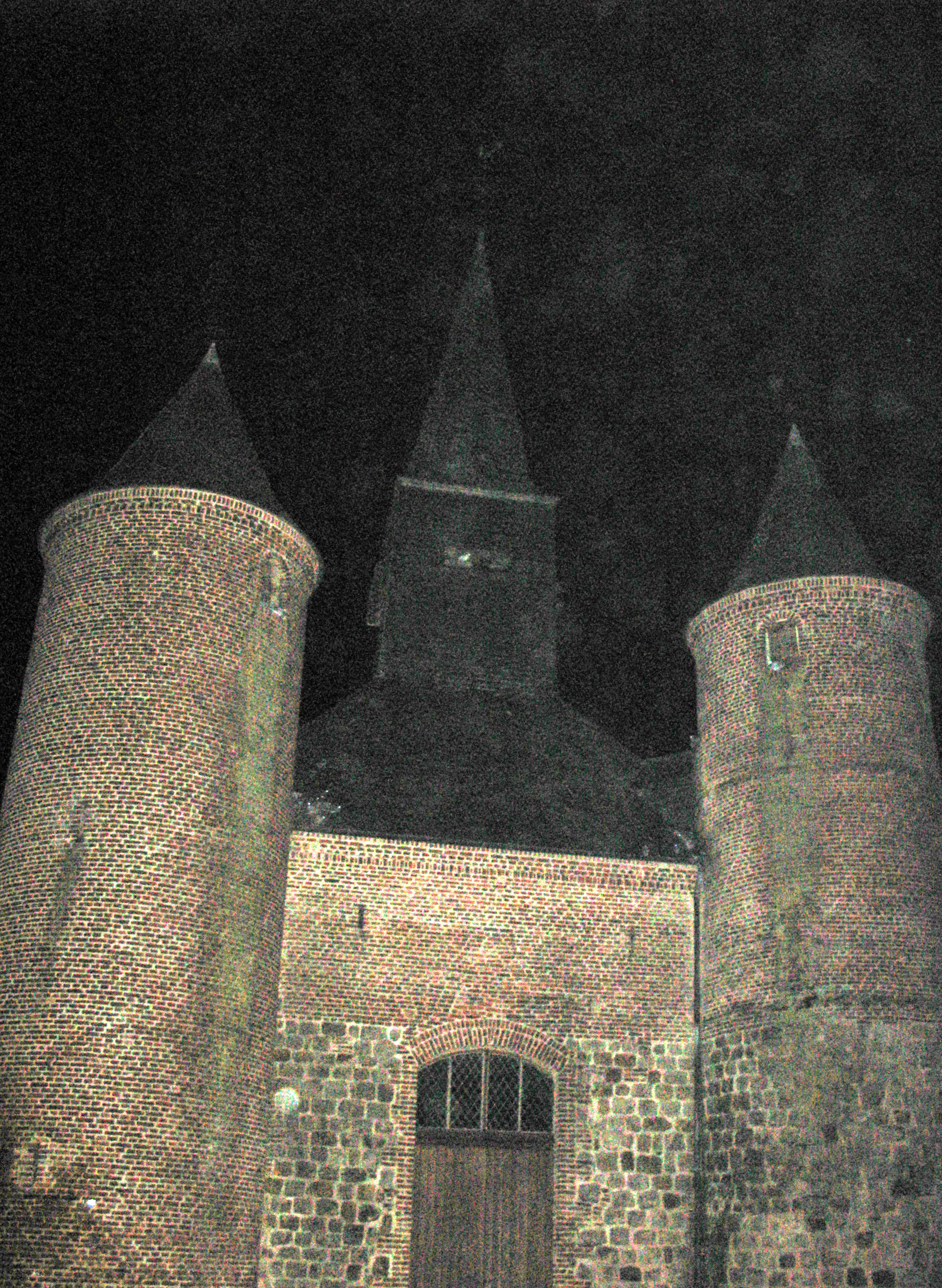 La Bouteille (Aisne, France) - L'église Notre-Dame est fortifiée. . . .